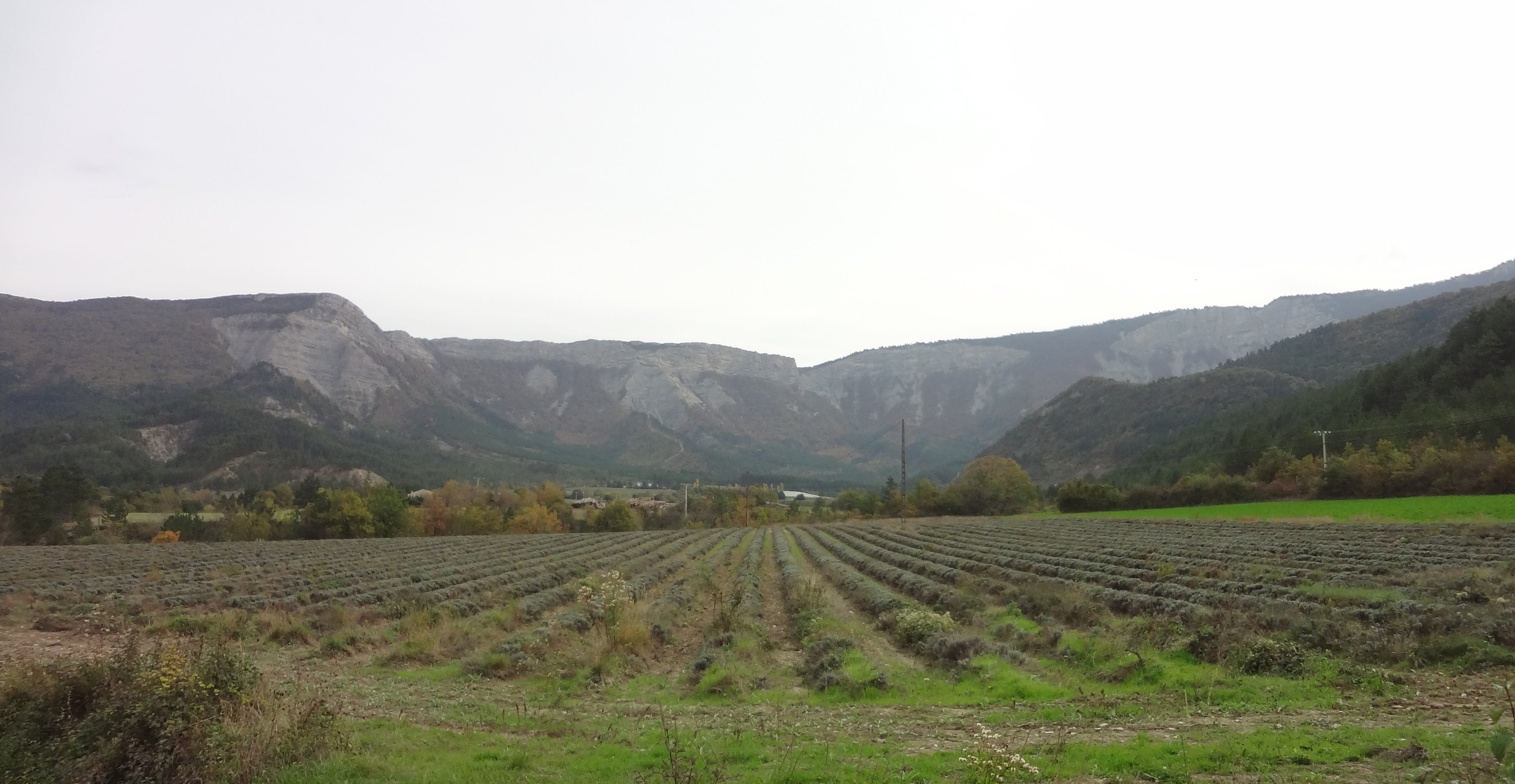 Champ de lavande et cirque de Valbelle